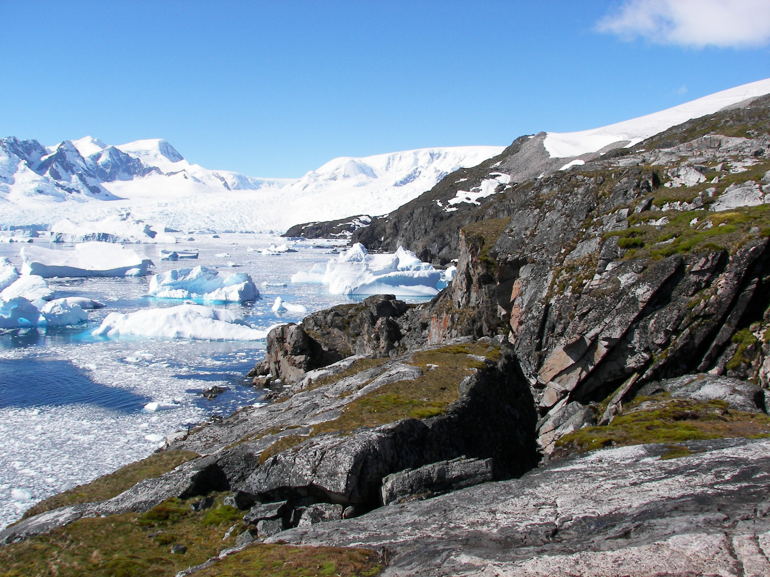 Base Primavera en la península Antartica